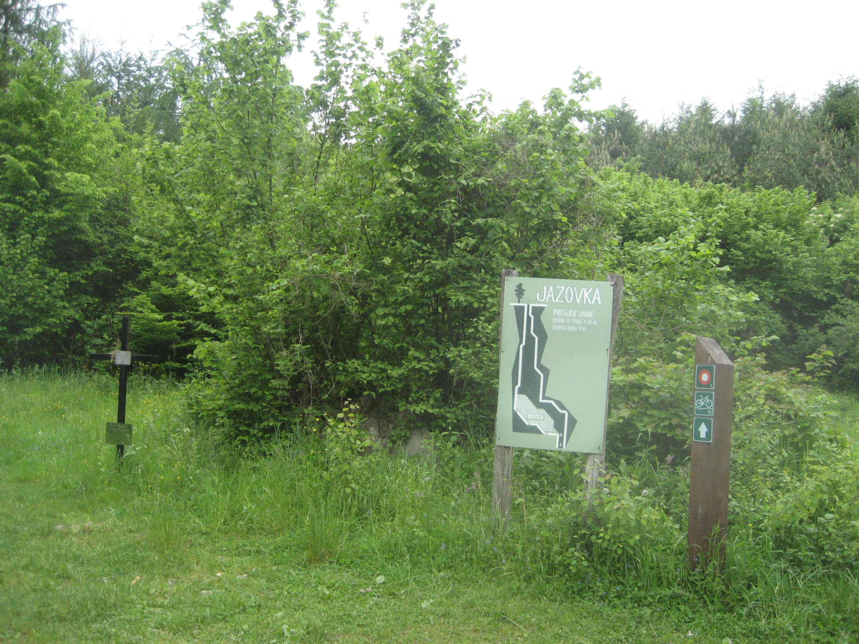 Jazovka1, Croatia